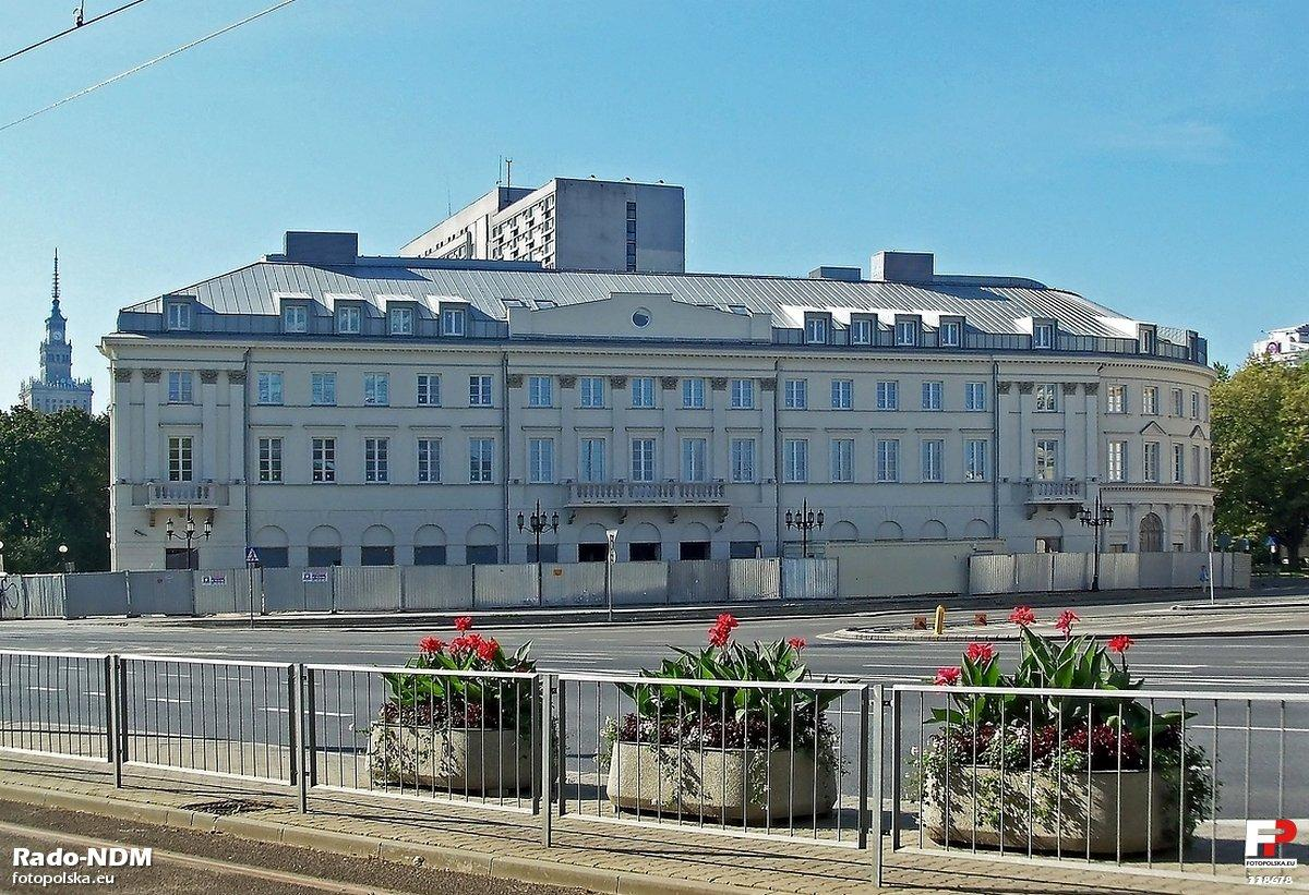 Hotel Saski po remoncie elewacji